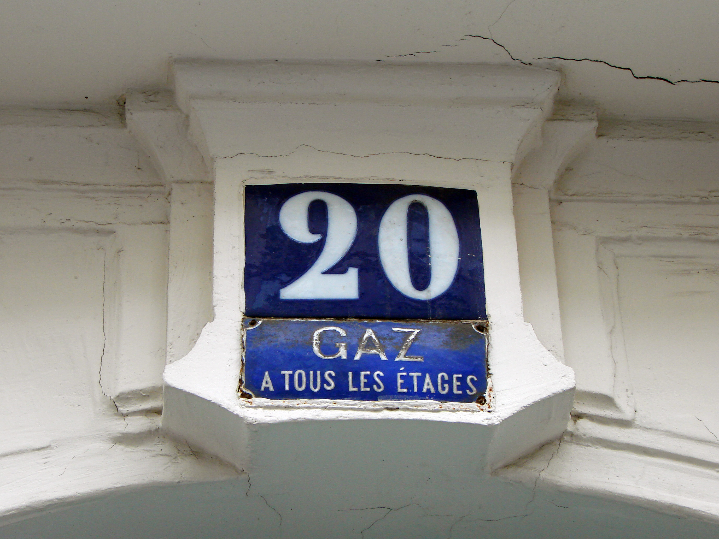 Plaque d'immeuble ancienne, avec l'inscription:"Gaz à tous les étages". Paris, 18ème arrondissement.